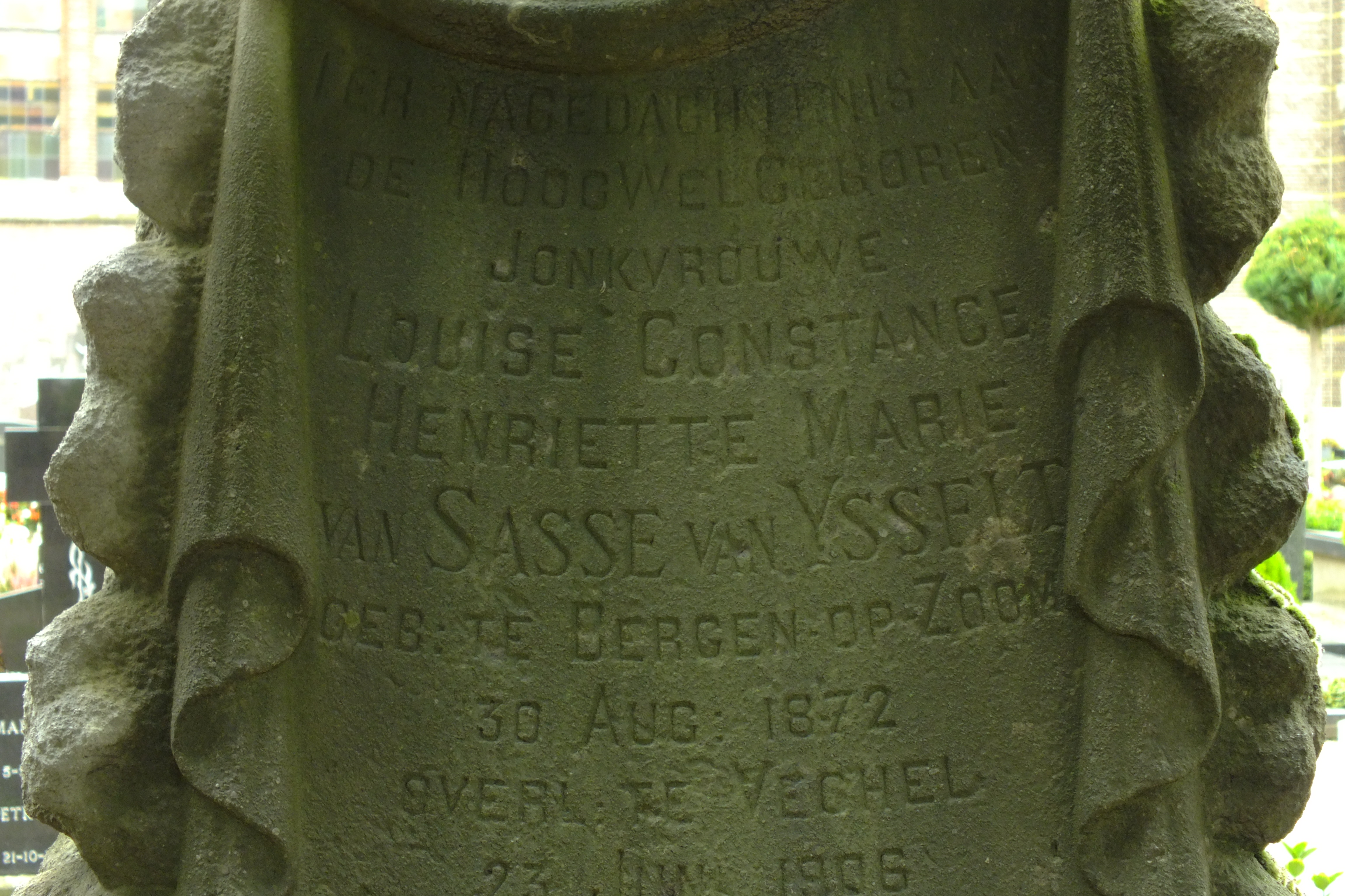 Grafmonument LCHM v Sasse v Ysselt Veghel Detail